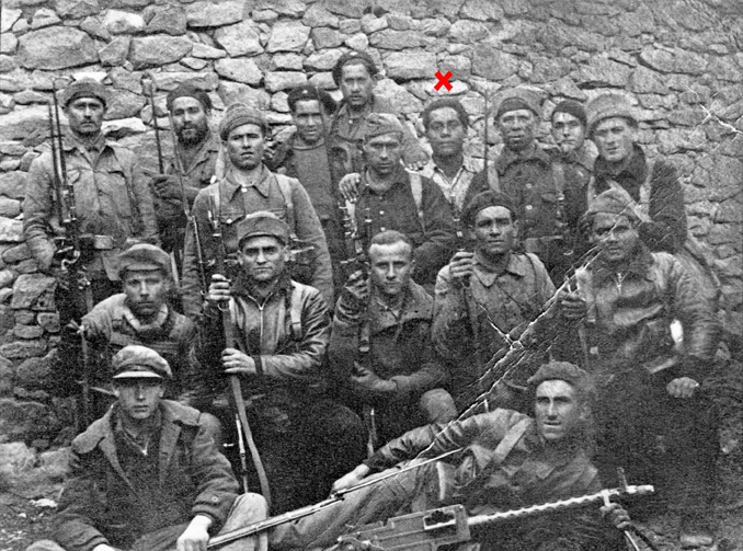 Néstor Sánchez (marca roja) con soldados polacos y españoles, en un descanso durante la guerra.